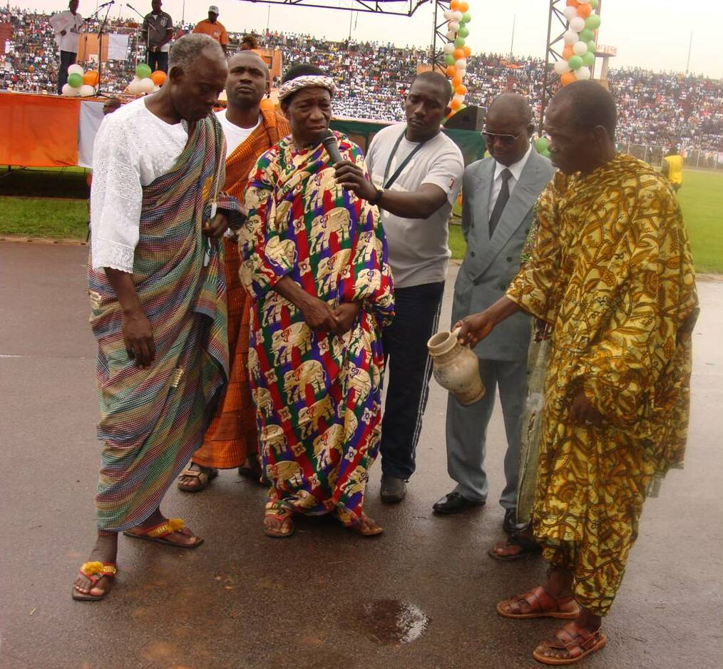 Le chef traditionnel de Bouaké et ses notables effectuant des libations à la cérémonie de la flamme de la paix à Bouaké (Centre de la Côte d'Ivoire)